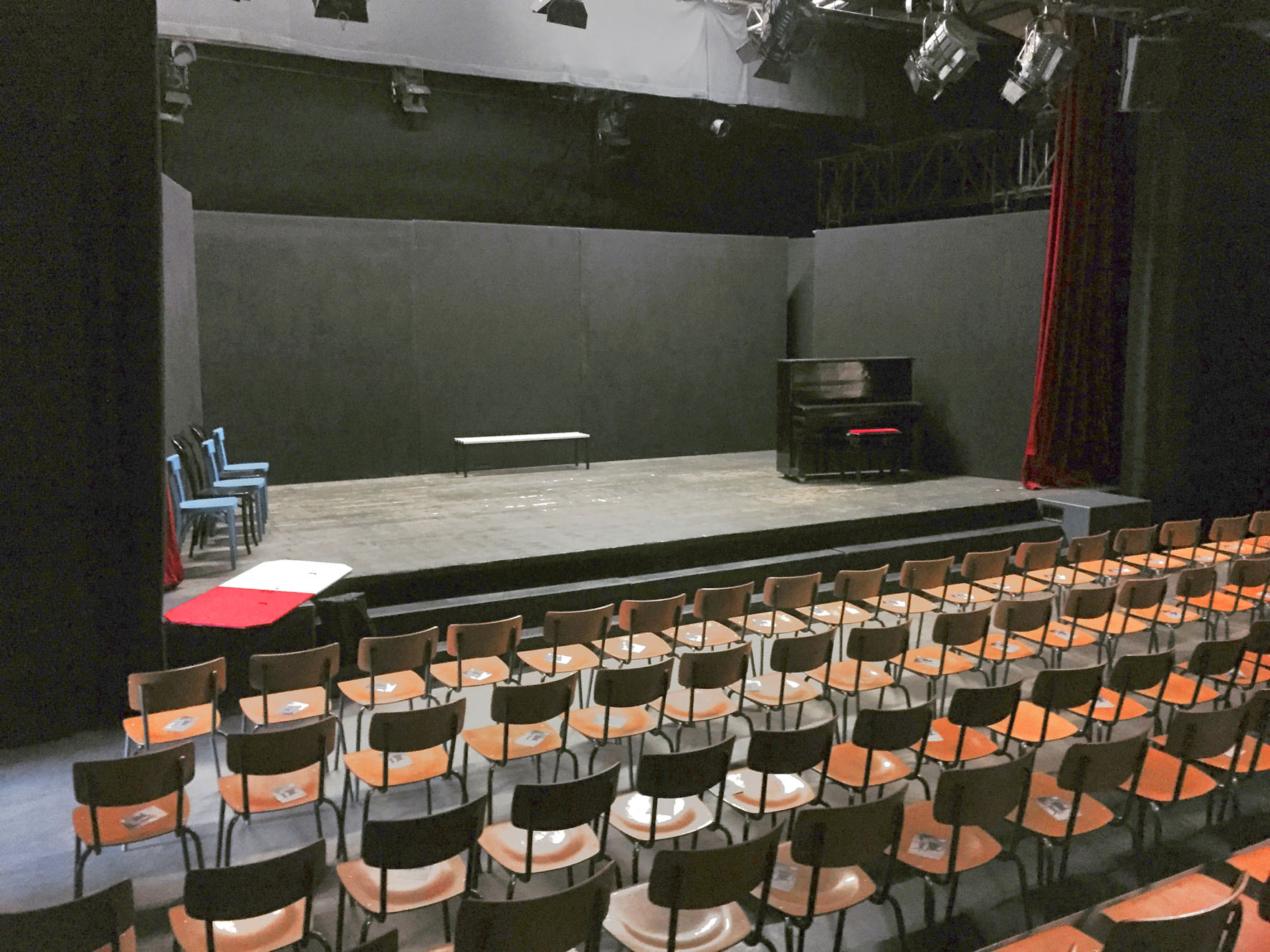 Saal und Bühne des Theaters Hamburger Sprechwerk